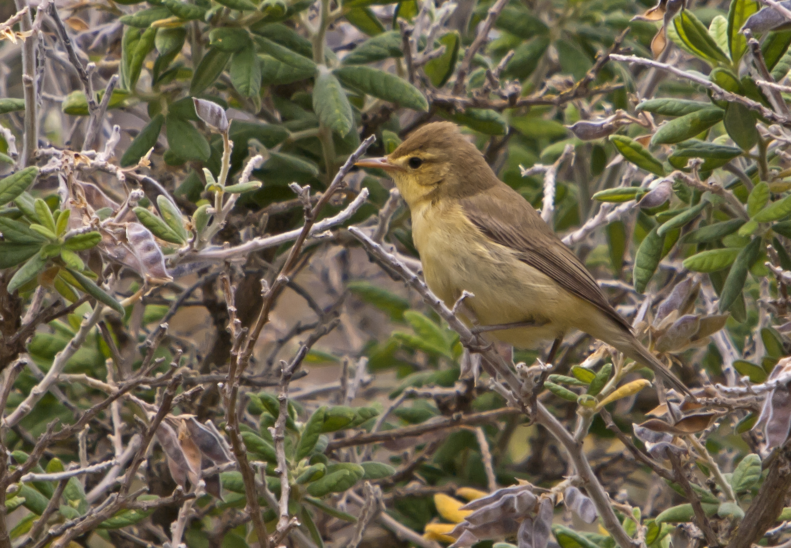 Mi primer (Hippolais polyglotta)